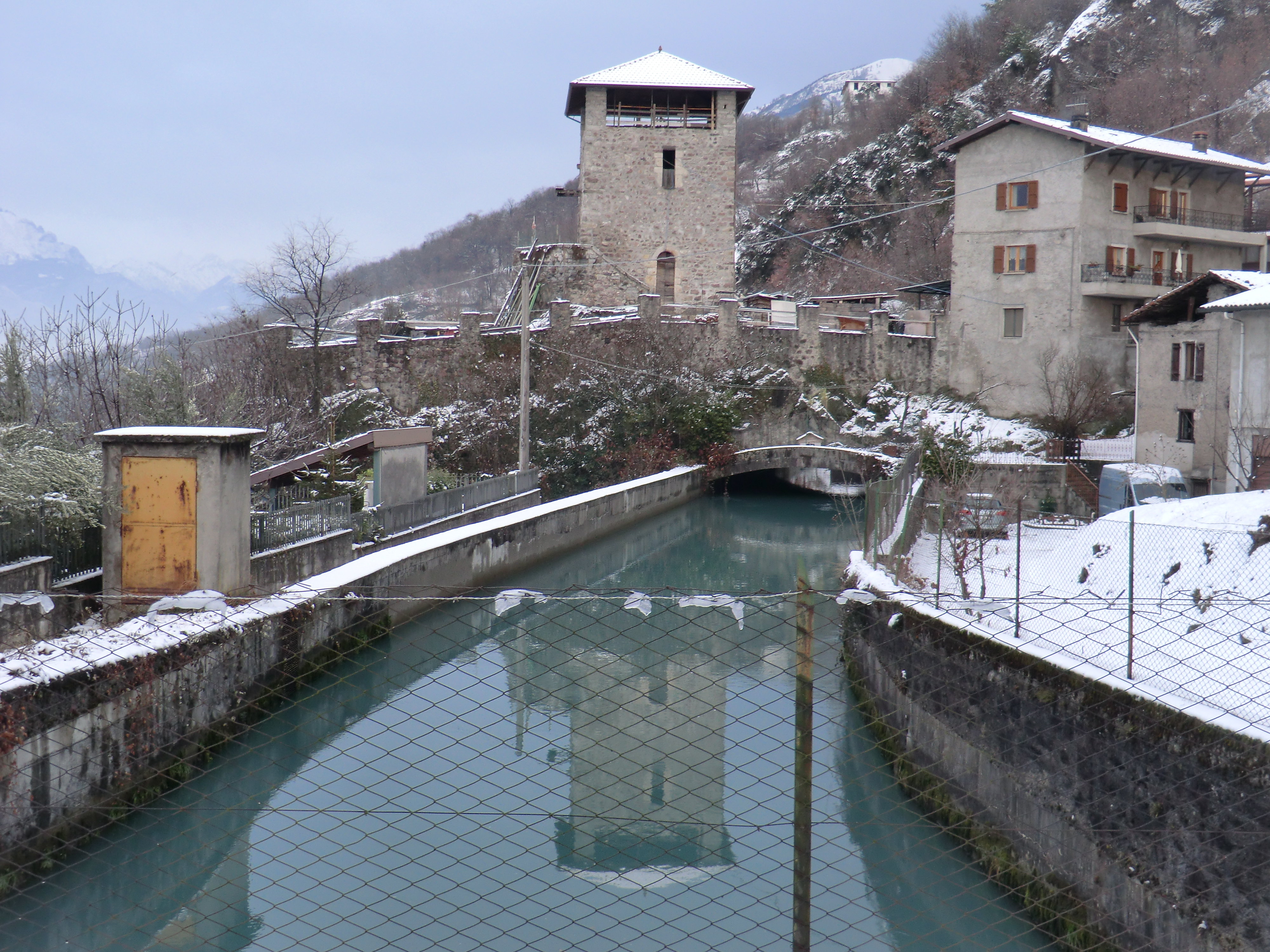 La Torre Alta (torre Federici) vista dal canale idroelettrico (gennaio 2017)